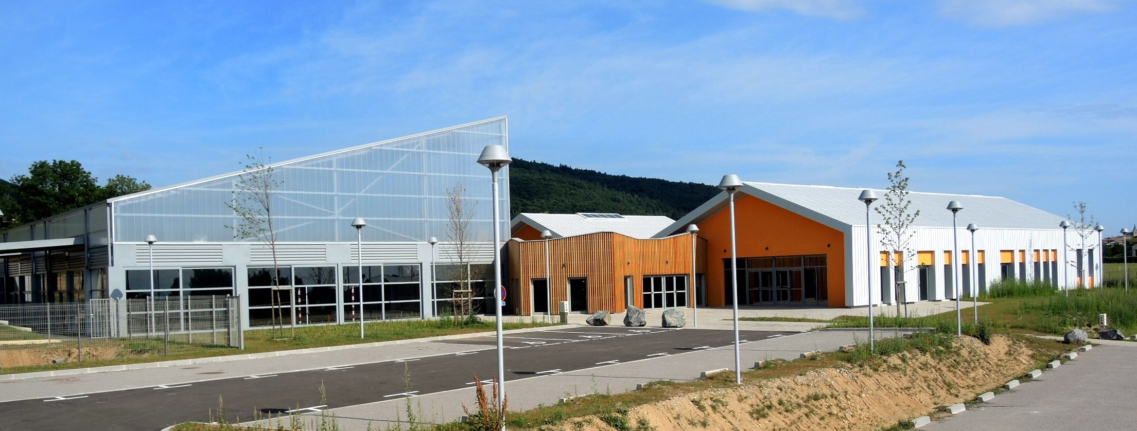 Peaugres détail